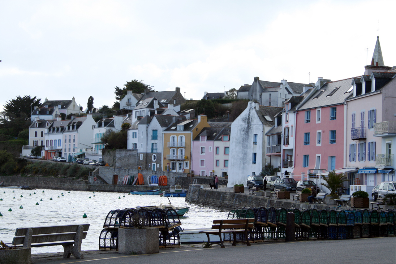 Quai de Sauzon